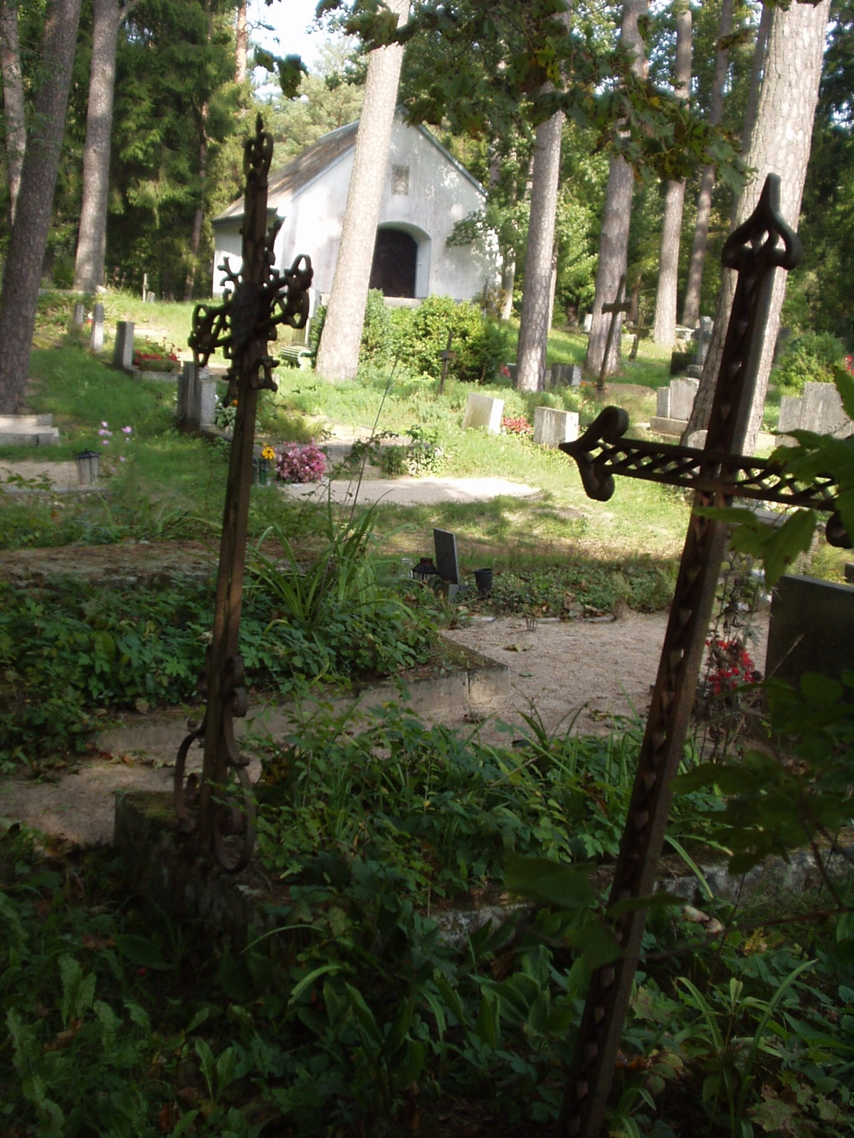 Kärla kalmistu